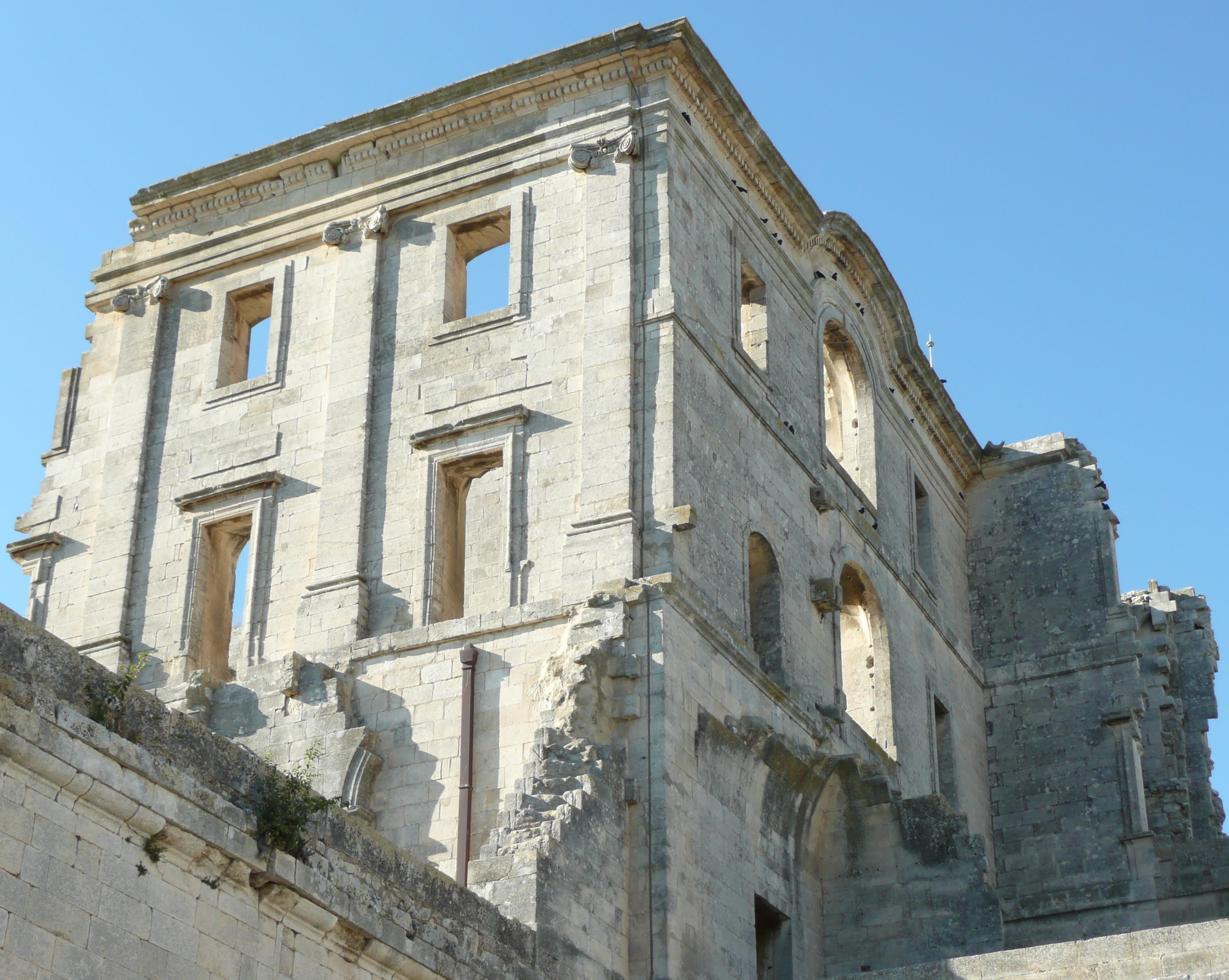 Arles (Bouches-du-Rhône_France), abbaye de Montmajour, monastère Saint-Maur (18e siècle), angle sud-est ayant résisté aux démolisseurs après la Révolution.